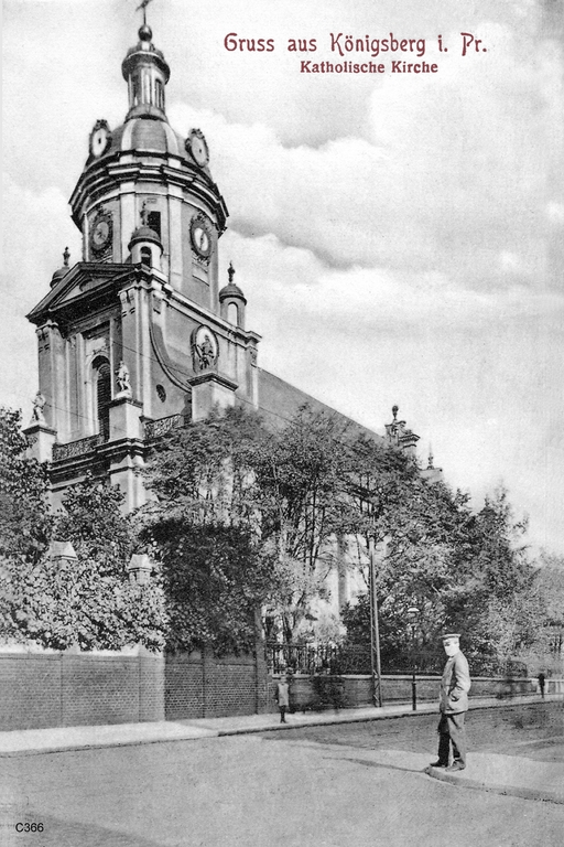 Probsteikirche in Königsberg